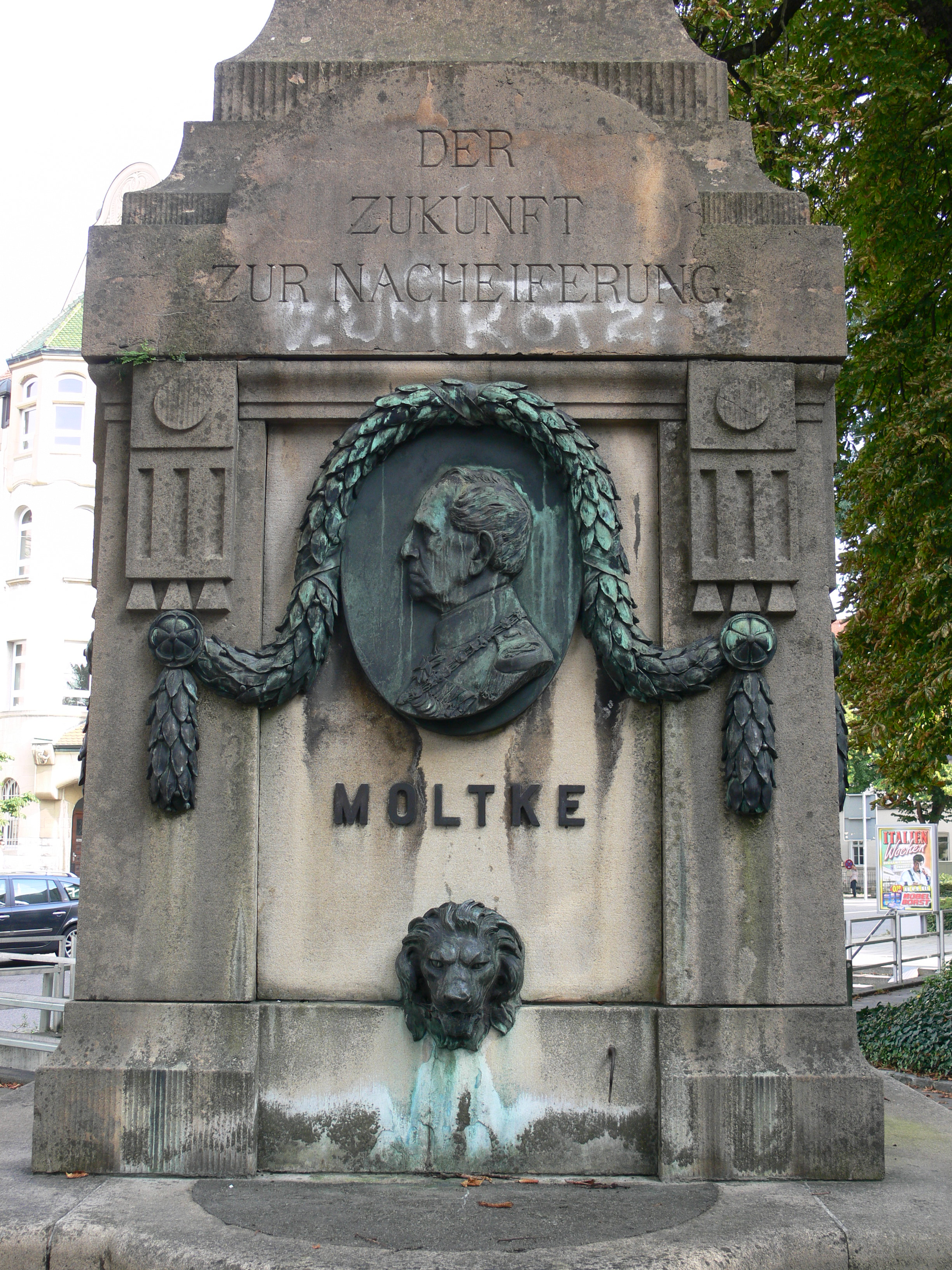 Ulm, Olgaplatz, Moltke-Denkmal, Detail: Moltke